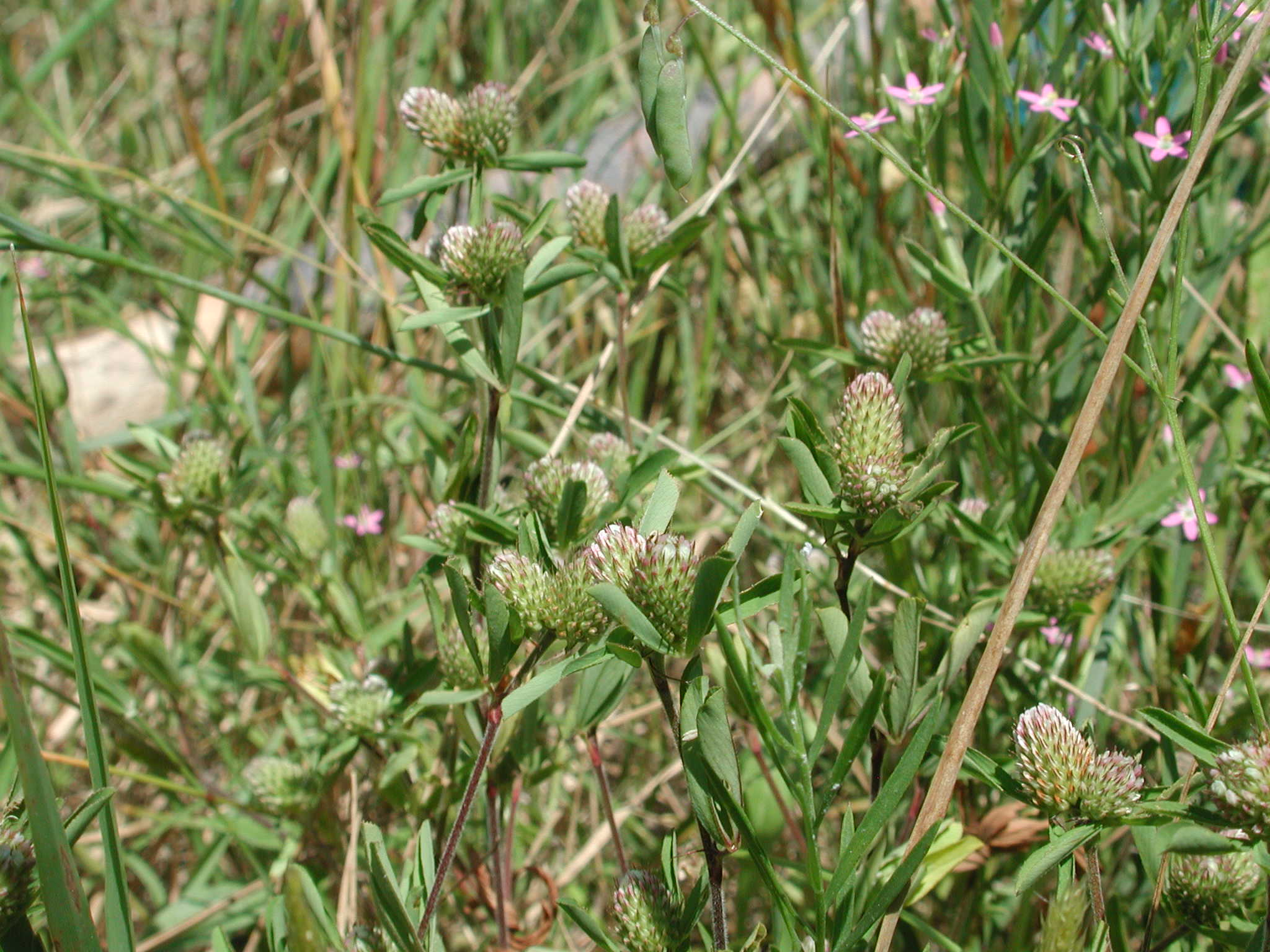 Infiorescenze di Trifolium bocconei